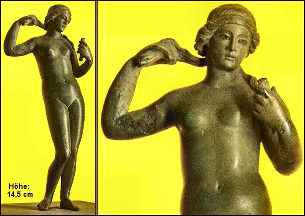 Statuette der Venus von Wels aus der Archäologischen Sammlung des Stadtmuseums Wels